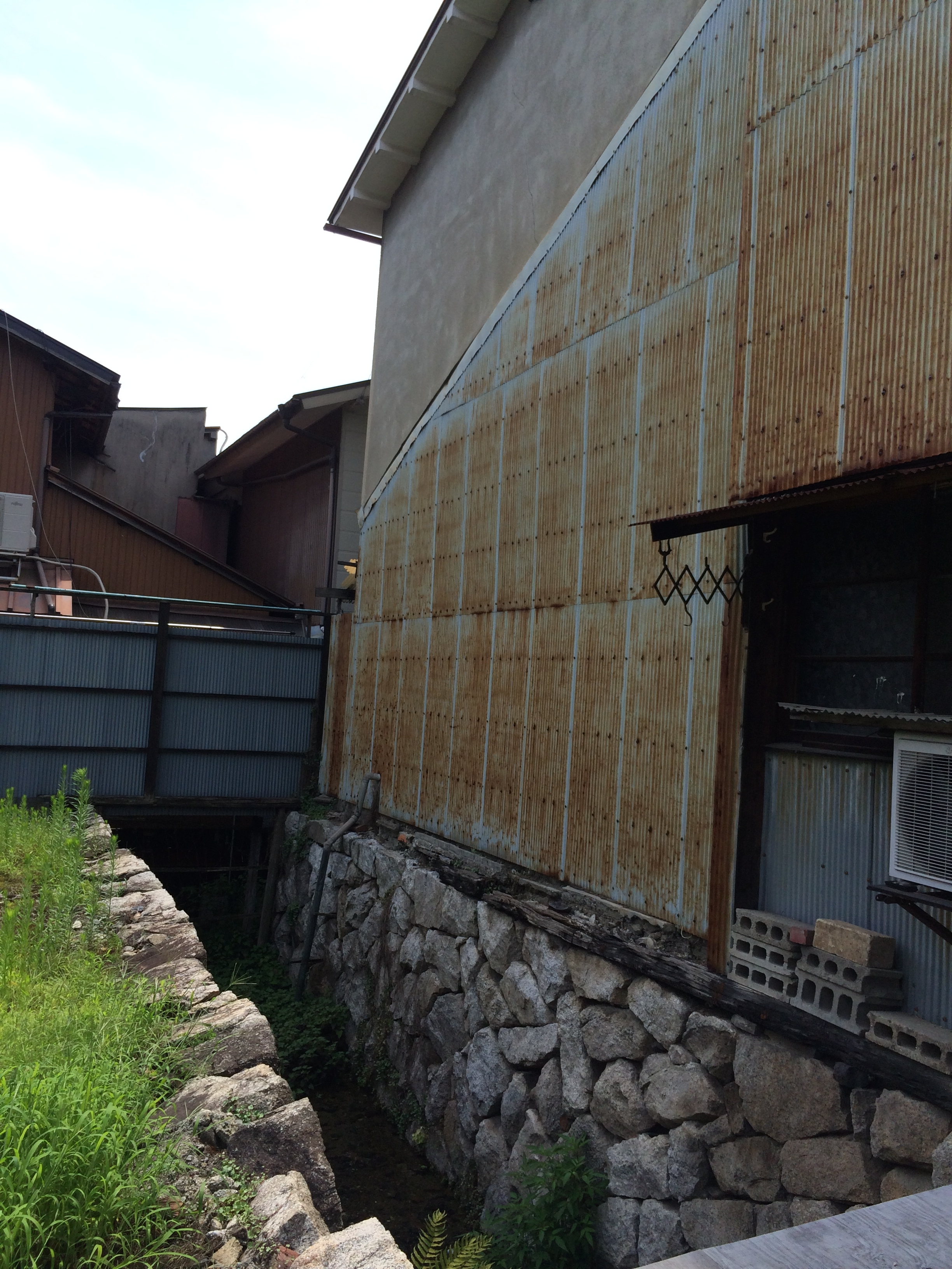 大正六年、竹中製麦所の竹中亀吉によって開削された水路。 琵琶湖疎水を水力利用した水車は岡崎一帯には多数あったが、全て暗渠となったため元の形で残る唯一のもの。